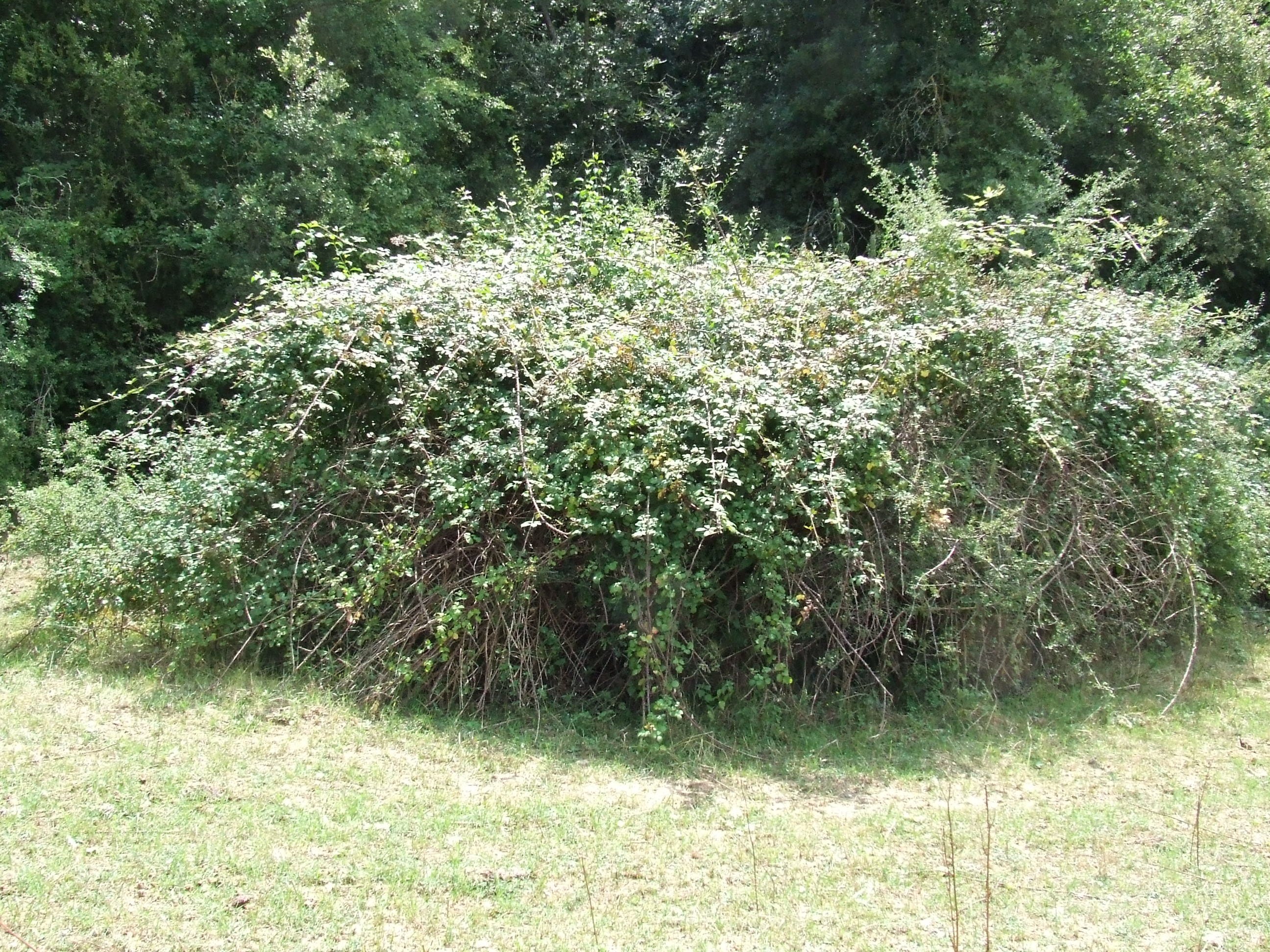 El Pou d'Esplugues (Castellcir, Moianès)